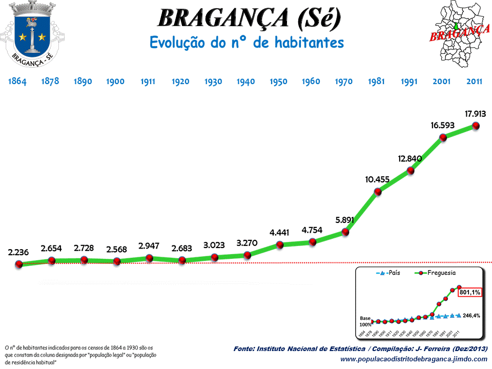 Evolução da População 1864 / 2011